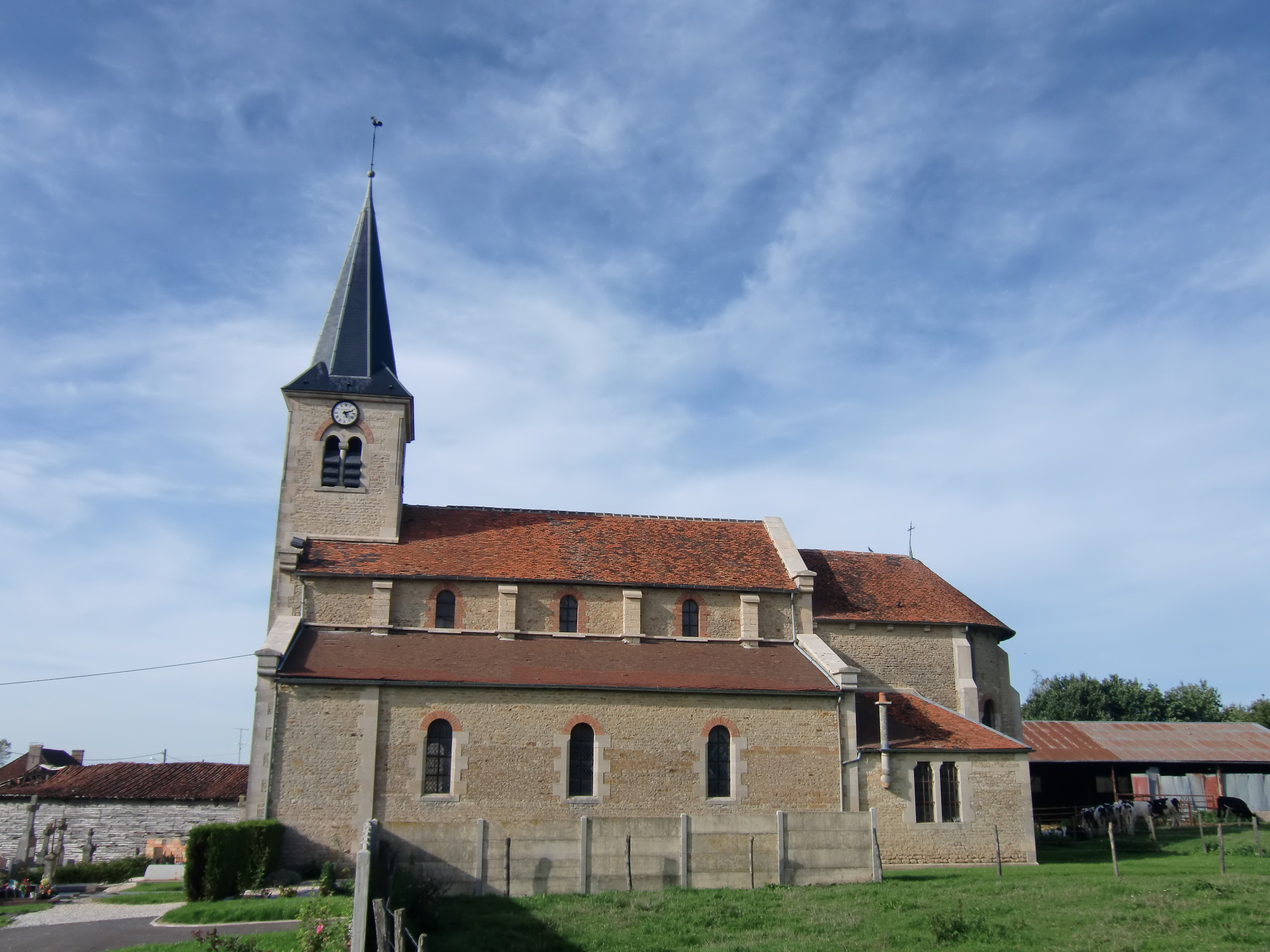 Eglise d'Epothémont (Aube, Champagne, France)